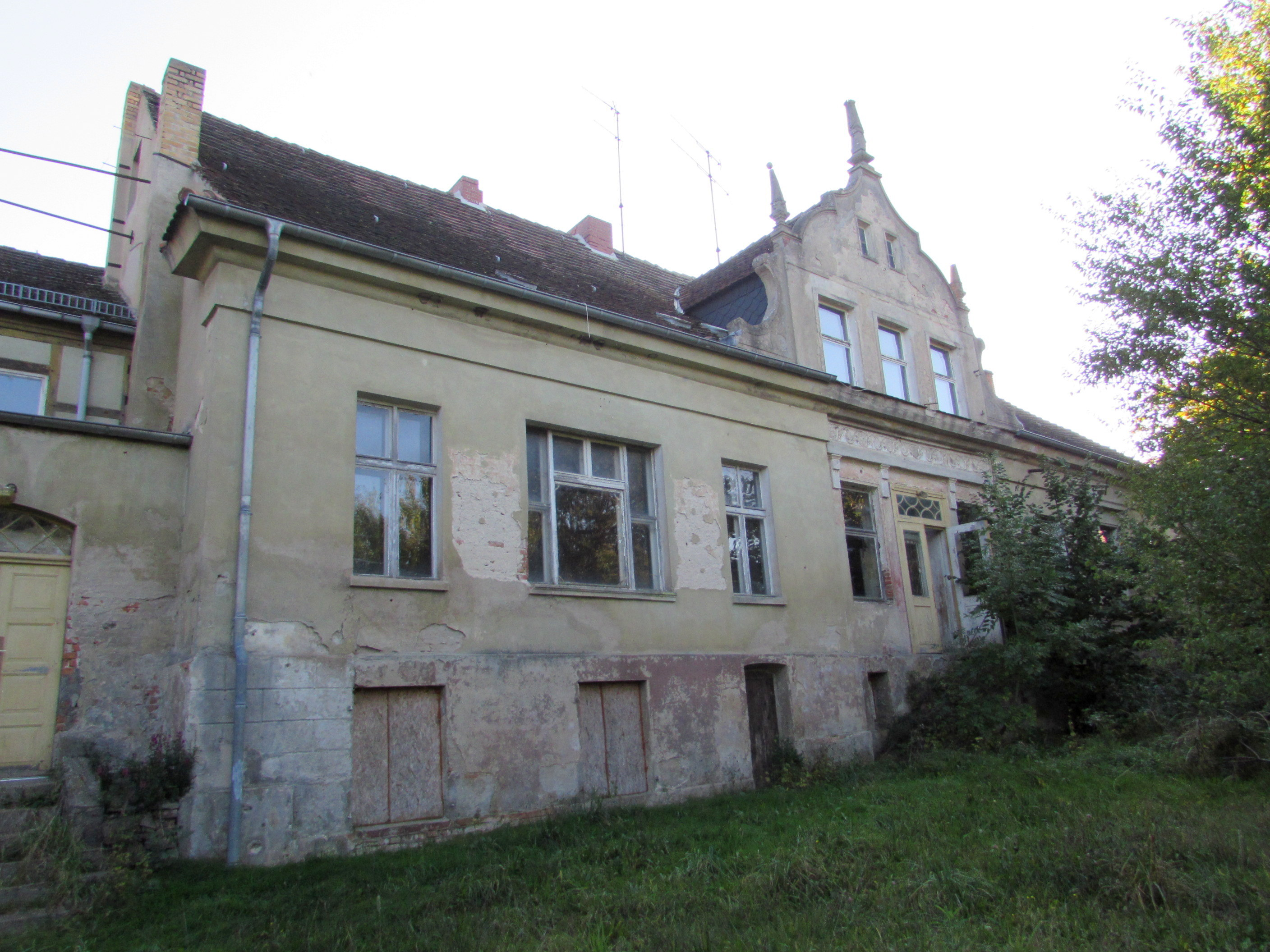 Gutshaus warchau nordfassade